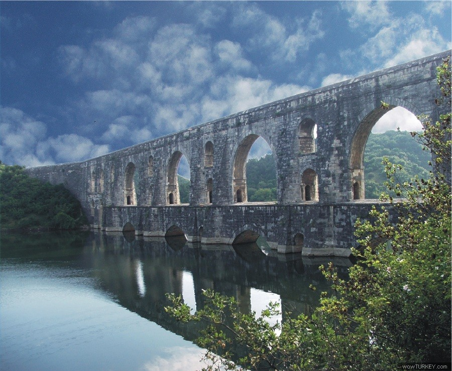 Kemal SÖYLEMEZ tarafından çekilmiştir.